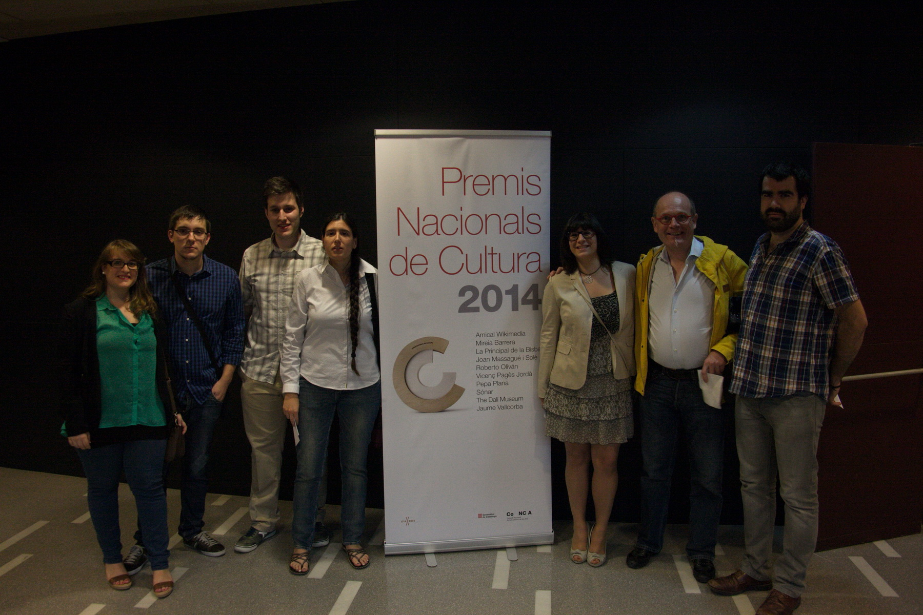 Lliurament dels Premis Nacionals de Cultura de Catalunya 2014. Santa Coloma de Gramenet, 2 de juny de 2014